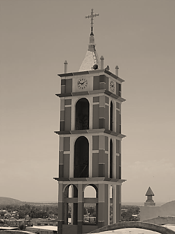 Torre sur del templo de Jesús de las Maravillas. Fotografía Jeshua Geraldi © D.R.